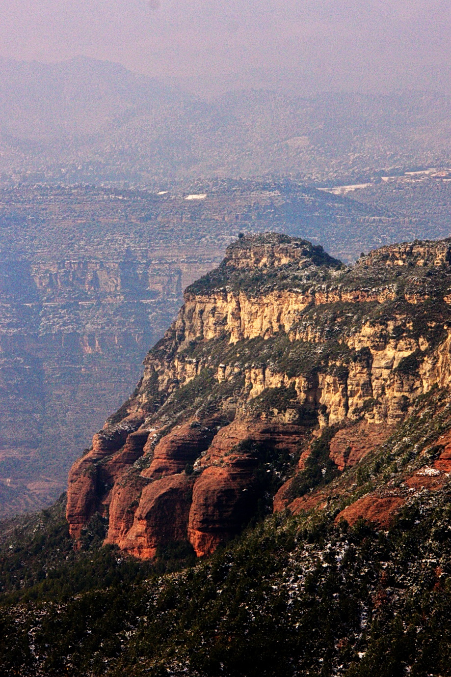 Turó de les Onze Hores als Cingles de Bertí (Bigues i Riells, Vallès Oriental, i Sant Quirze Safaja, Moianès)